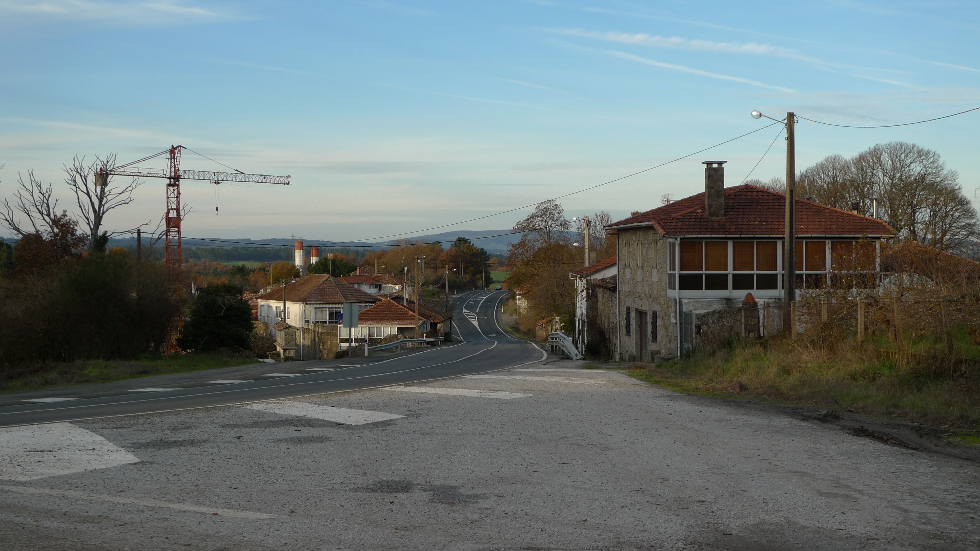 Rabelas - Parroquia de Veiga - Chantada (Lugo)